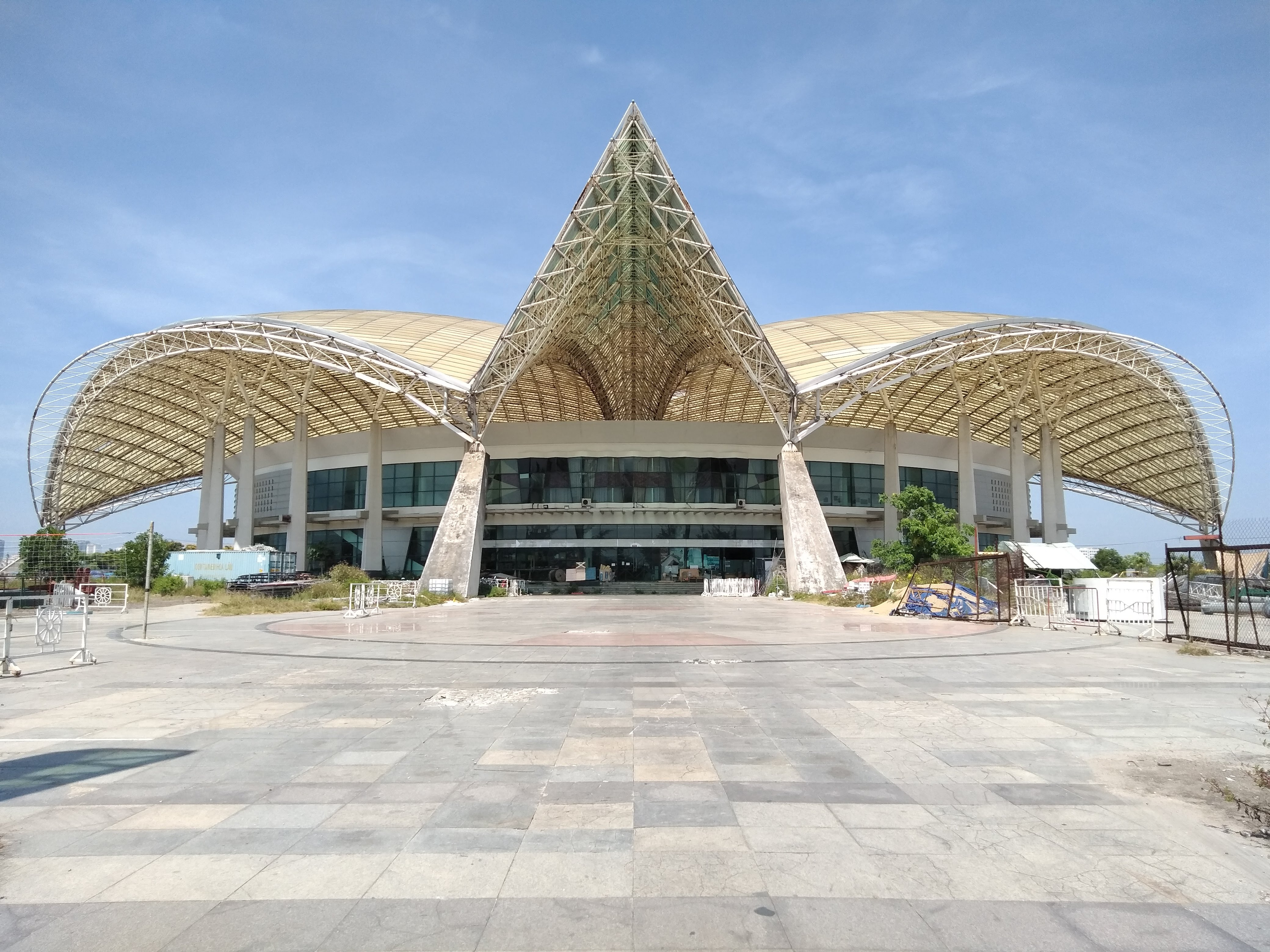 Nhà Thi đấu Đa năng Đà Nẵng